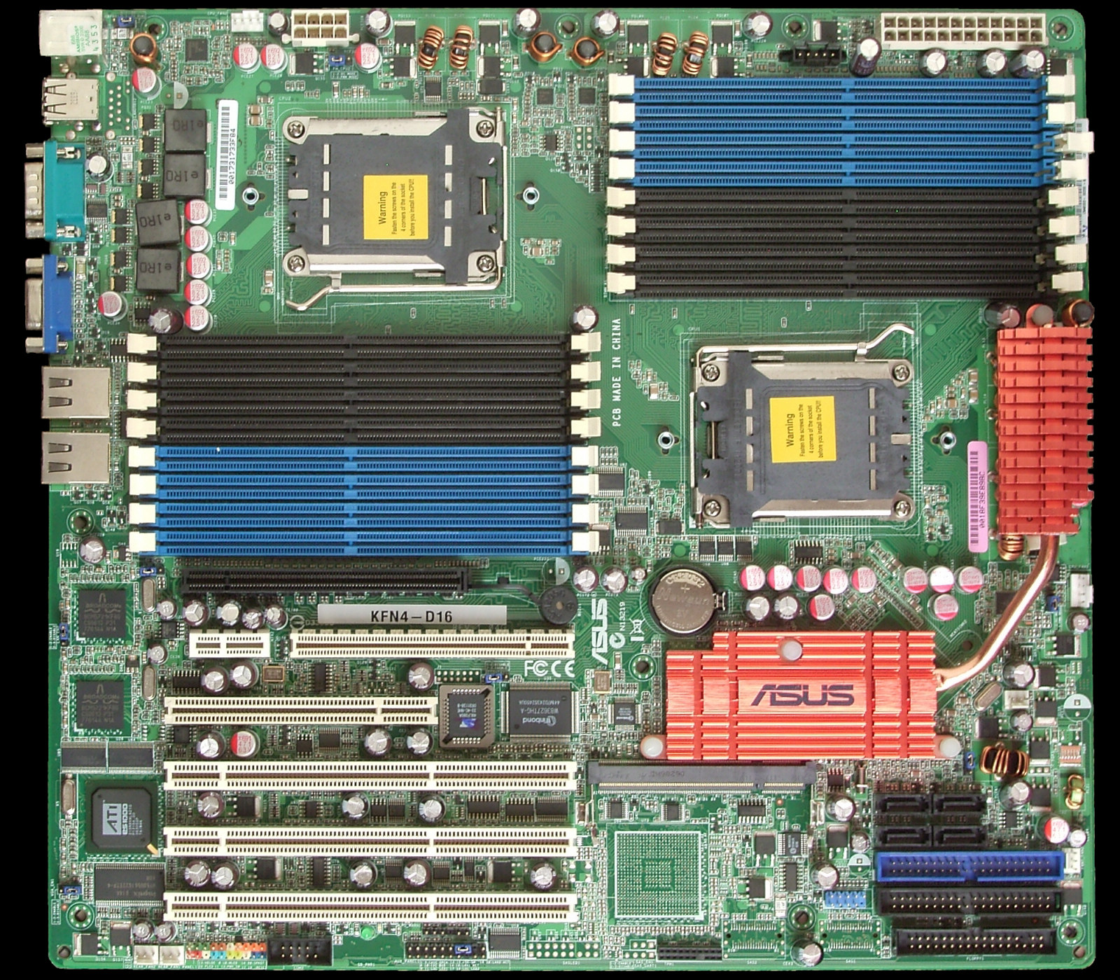 Servermainboard Asus KFN4-D16 für 2 AMD Dual-Opteron und max. 32GB Ram, Aufnahme mit Ricoh Caplio GX